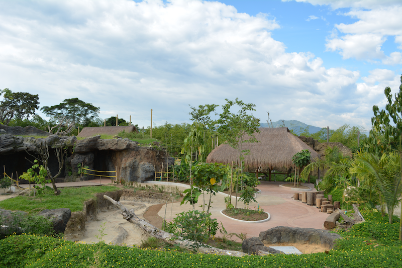 Bosques Andinos